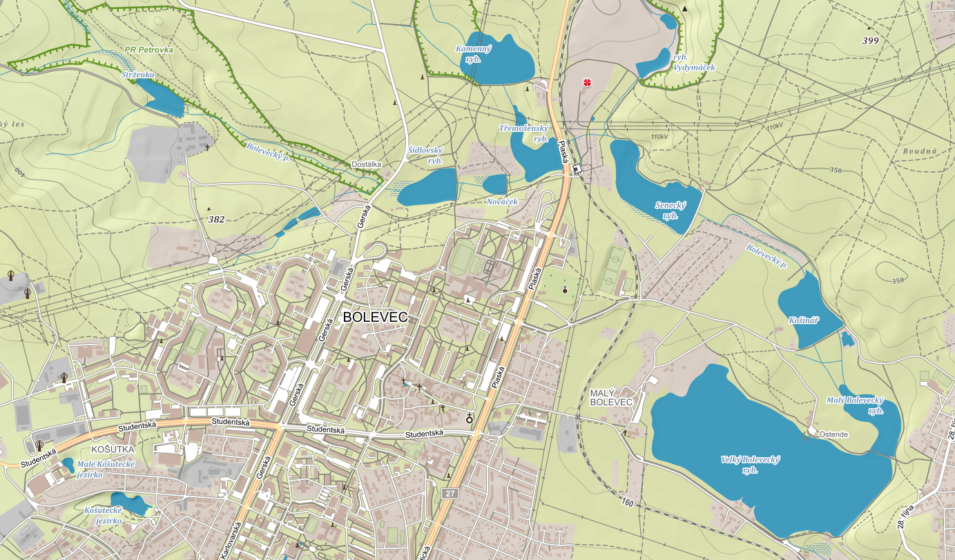 Výřez zeměpisné mapy zachycující severní okraj města Plzně s Boleveckou rybniční soustavou známou jako Bolevecké rybníky.